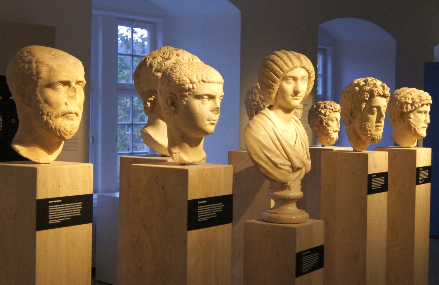 Antikensammlung, Landesmuseum Württemberg